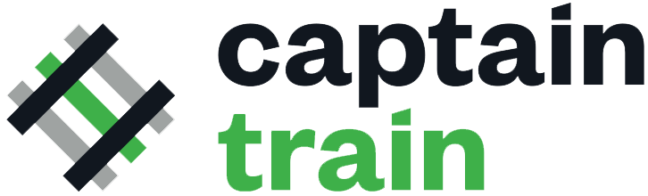 Logo de Captain Train SAS depuis septembre 2015.